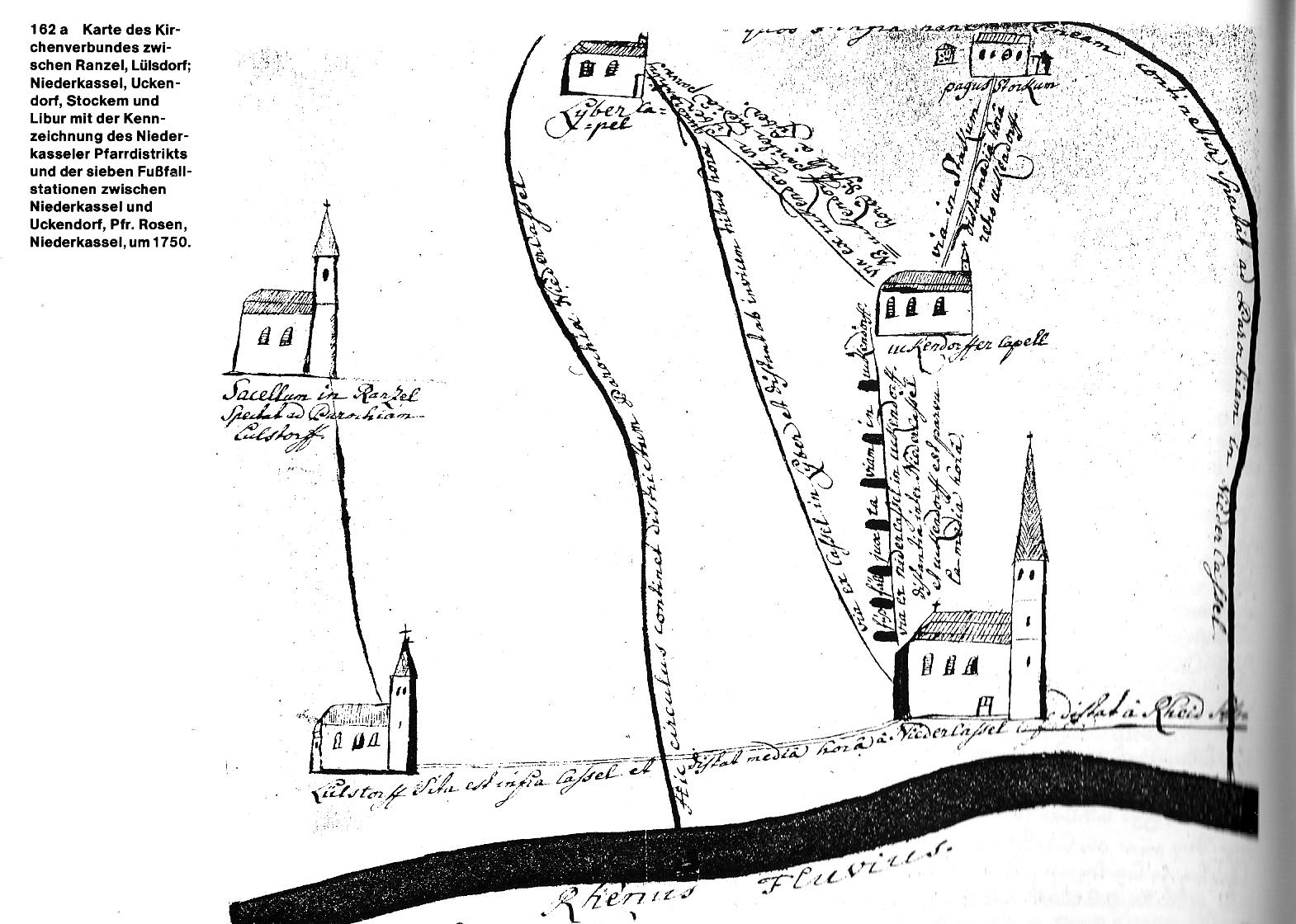 Niederkasseler Pfarrdistrikt der St. Matthäuskirche um 1750